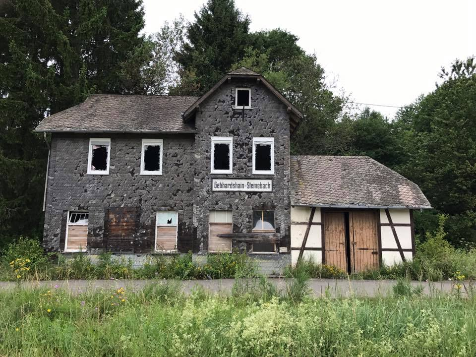 Ehemaliger Bahnhof Gebhardshain-Steinebach. Das Gebäude nebst Schuppen und Nebengebäude wird heute nicht mehr genutzt.